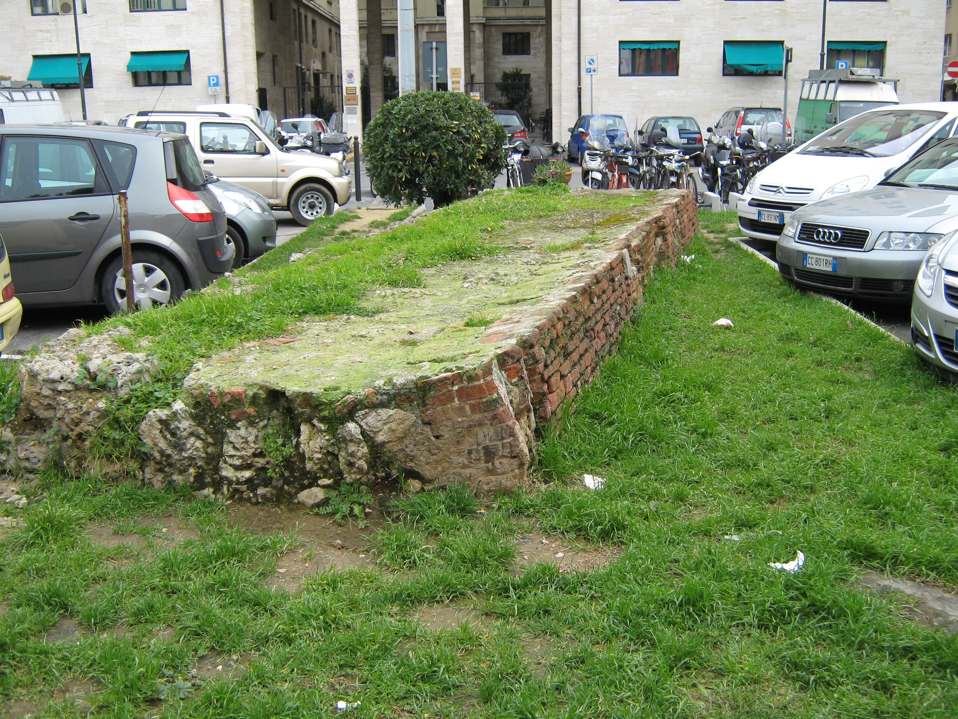 Livorno, ciò che resta del complesso del Bagno dei Forzati all'altezza della scomparsa chiesa della Purificazione.